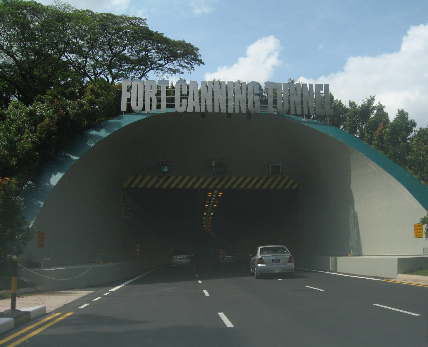 Fort Canning Tunnel, Singapore.